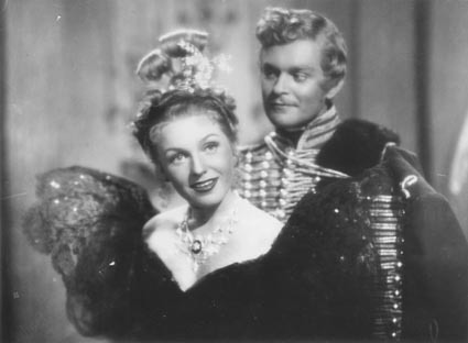 Screenshot Assia Norris Antonio Centa - Una scena del film Un colpo di pistola, film diretto da Renato Castellani,(1942)